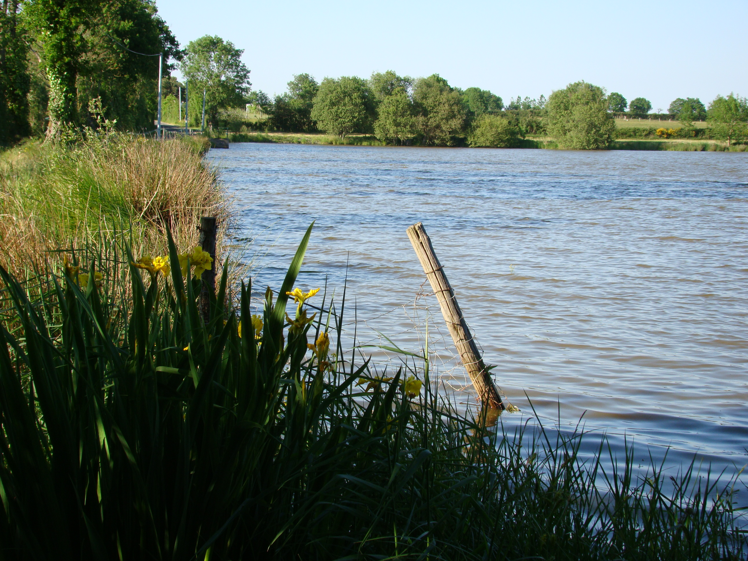 l'étang de l'Ajonc à Noirterre (Deux-Sèvres - France)